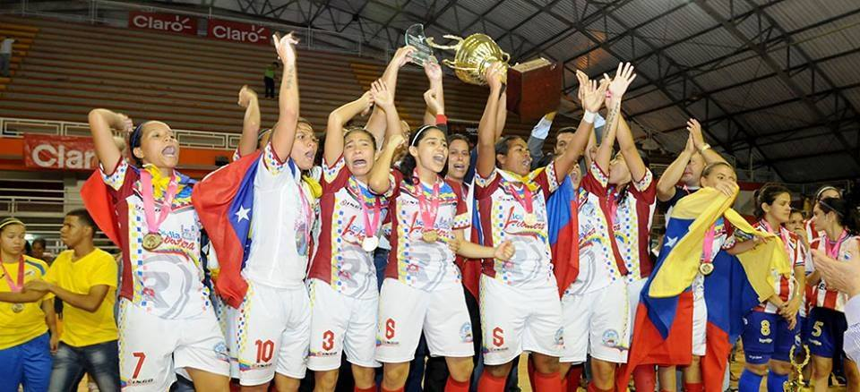 Foto da Seleção Venezuelana de Futebol de Salão no Campeonato Sul Americano Feminino de Futebol de Salão de 2015 em Cali, na Colômbia.